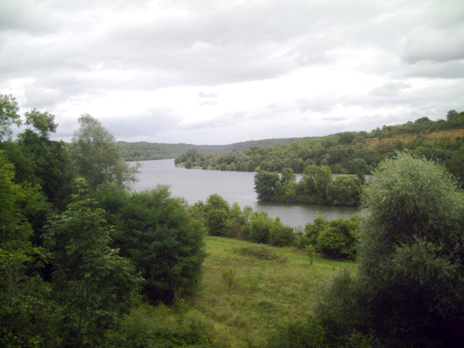 Villey-Saint-Étienne: la Moselle